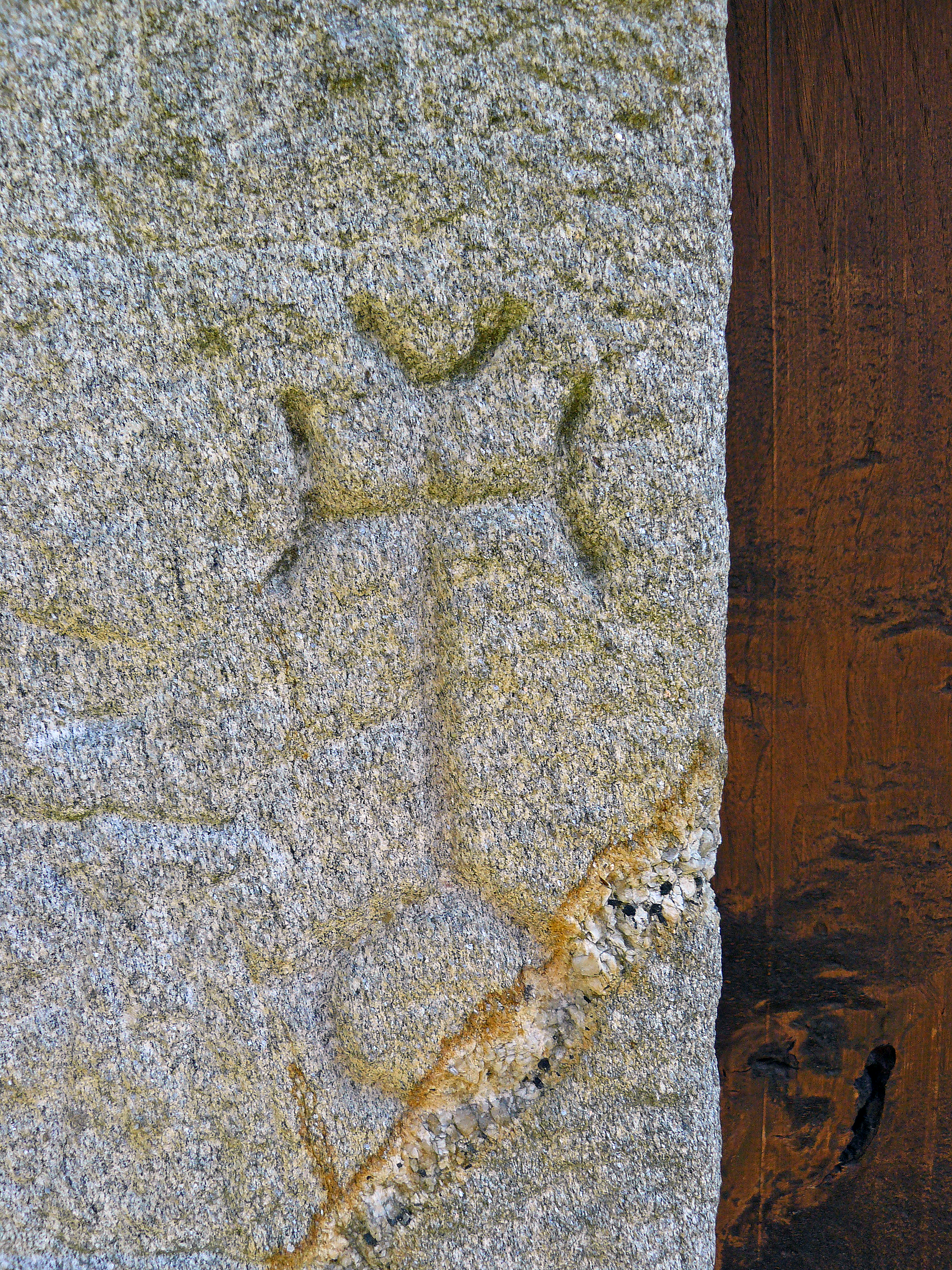 Inscricióndunha cruz con cálice muíño Folón